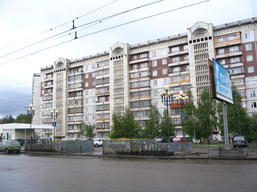 Подземный переход на 2-м микрорайоне. Иркутский тракт 85.